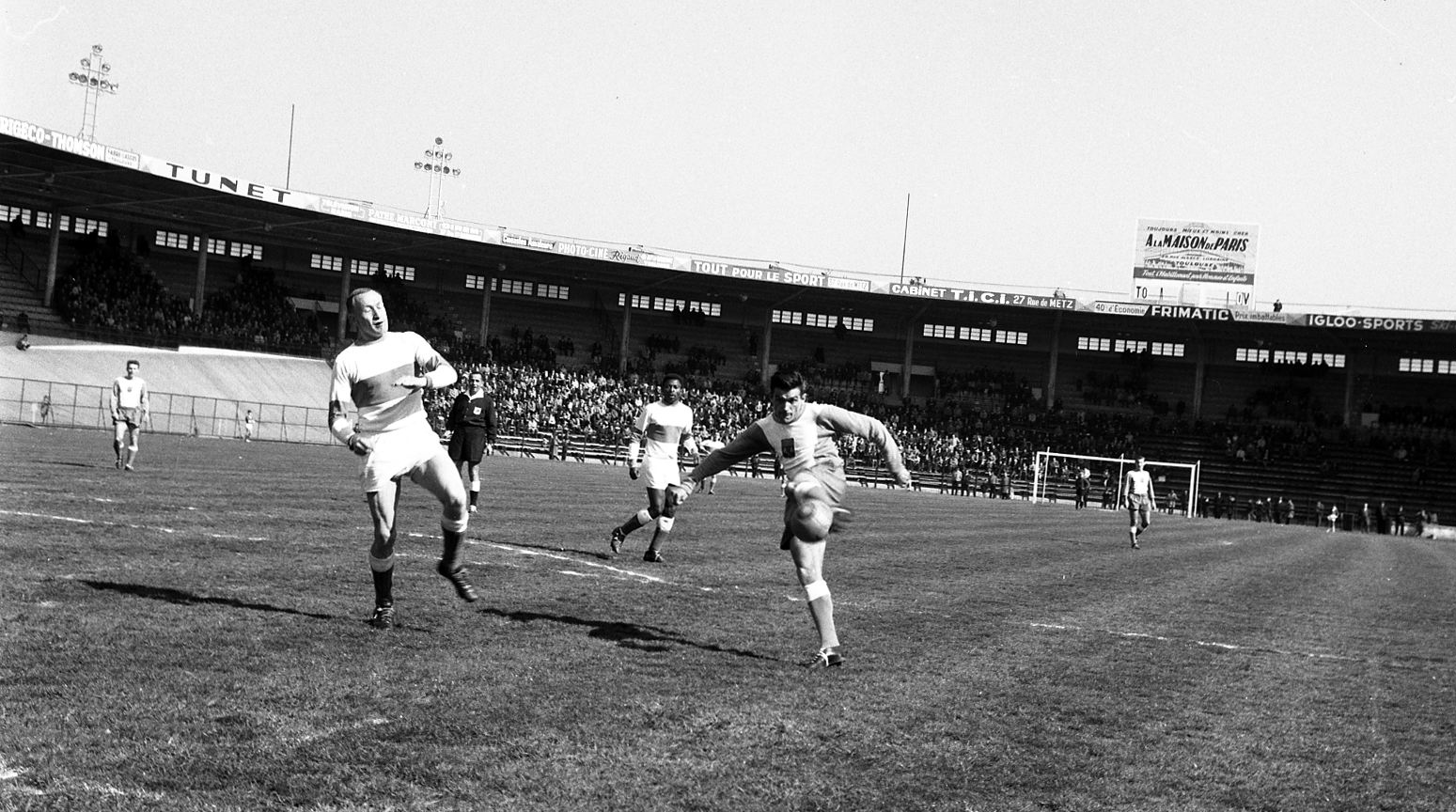 Stadium municipal de Toulouse, 1bis allées Gabriel-Biénès. 18 mars 1962. L'équipe du Toulouse Football Club rencontre l'équipe de Montpellier. Cliché pris durant le match ; au 1er plan action de jeu ; en arrière-plan gradins avec spectateurs.